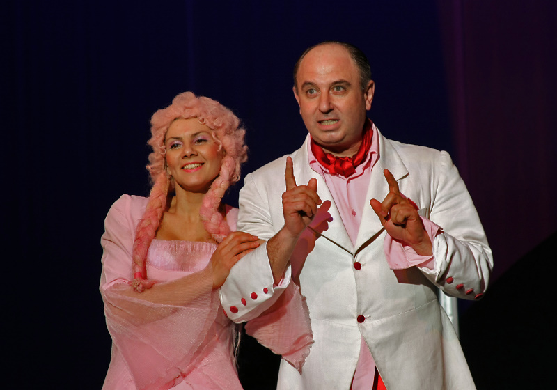 Албена Начева и Николай Урумов в постановка на "Криворазбраната цивилизация" на Шуменския театър, март 2009 година